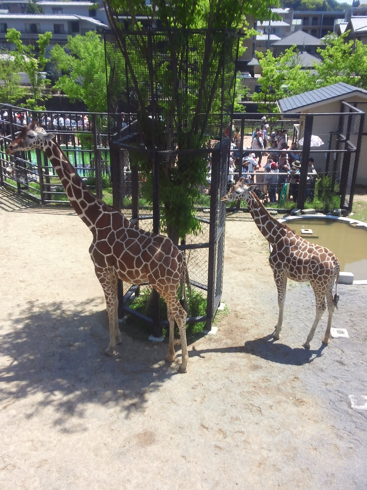 京都市動物園 - キリン